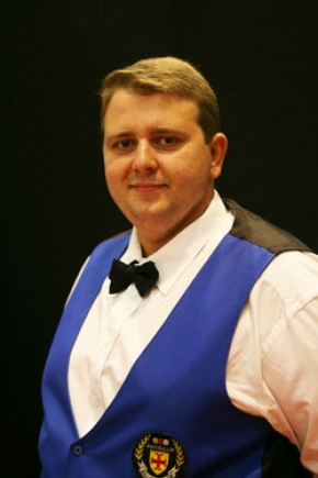 Alexandre Guillemant - Kozoom